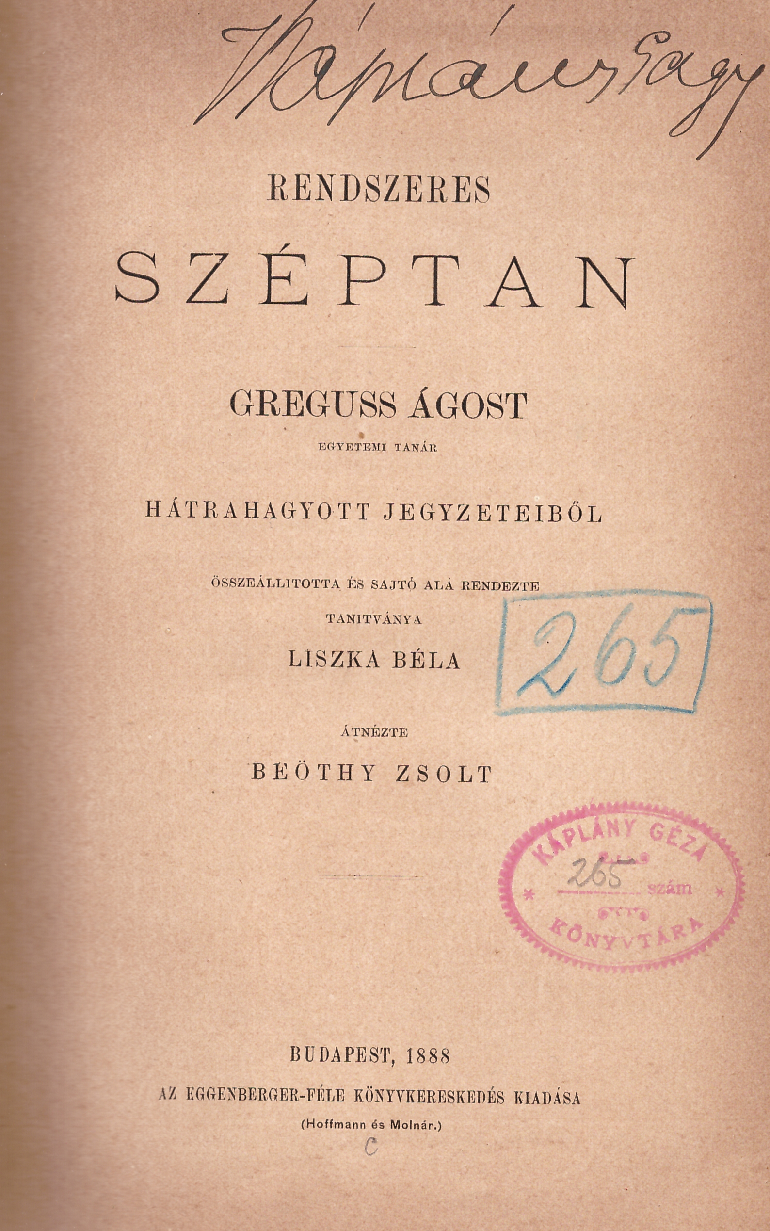 Greguss Ágost (1825-1882): Rendszeres széptan (saját készítésű kép)